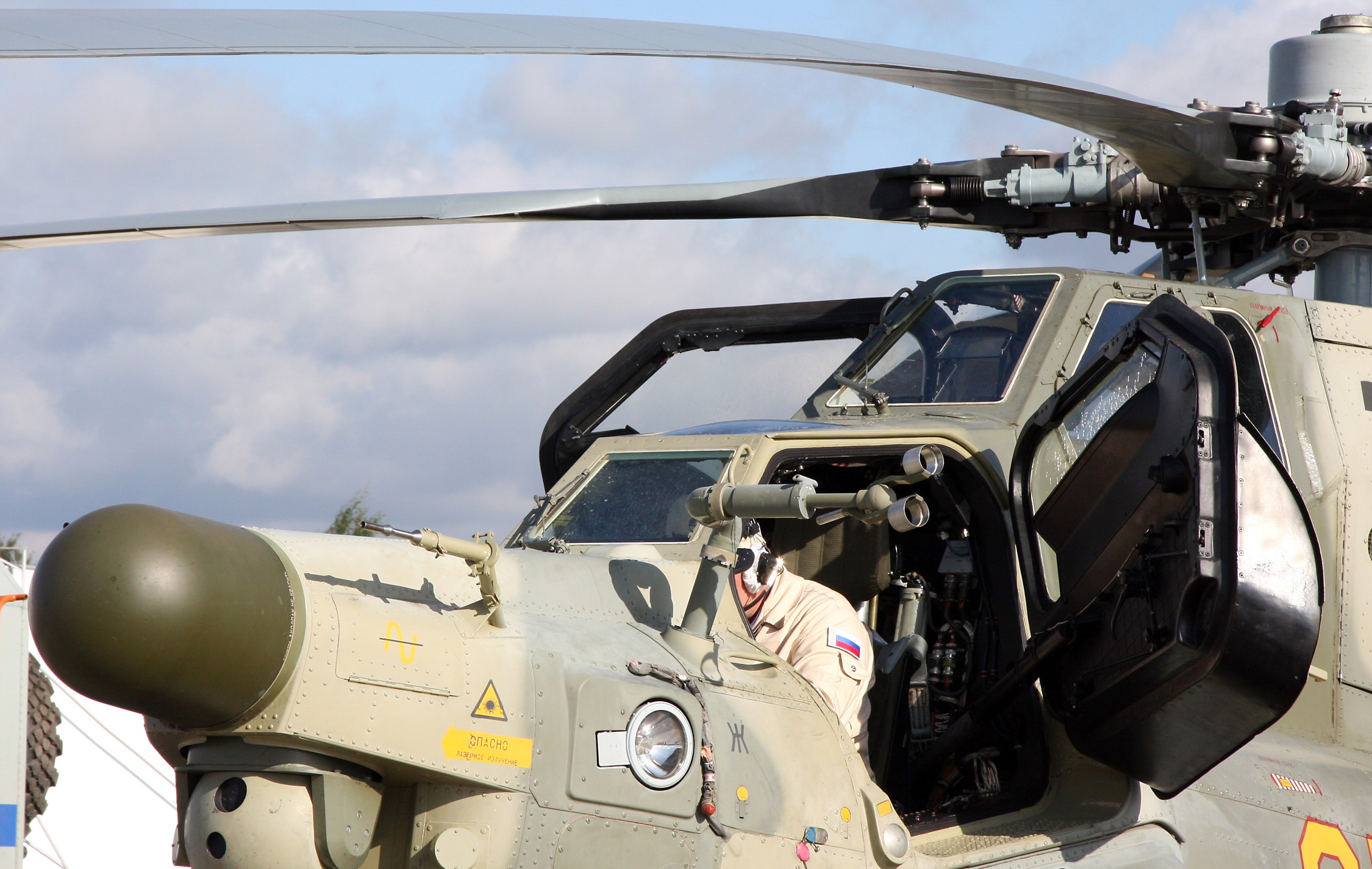 Ми-28Н